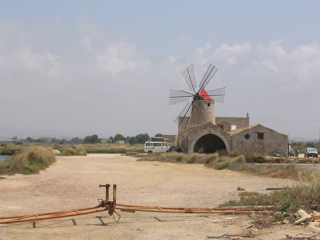 Immagine delle saline di Trapani.